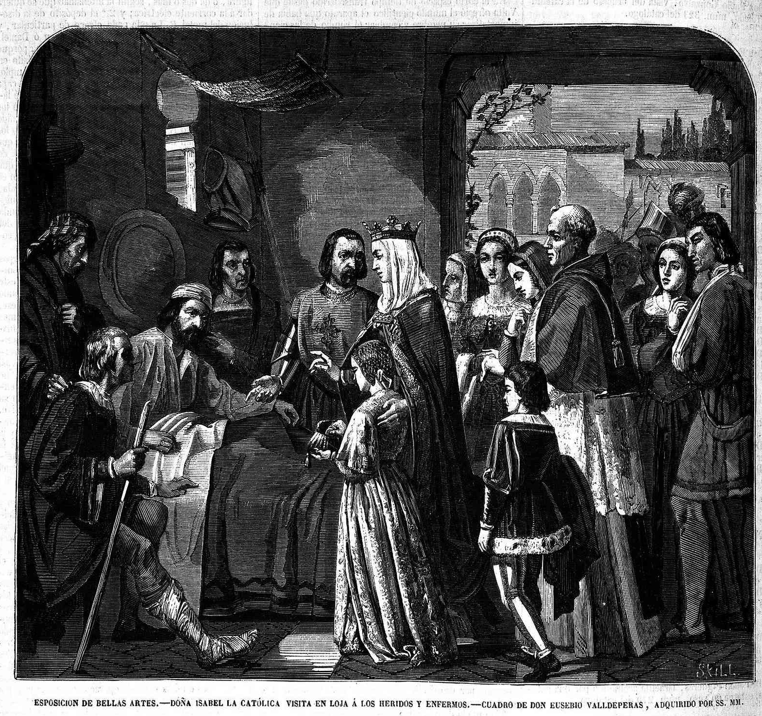 Doña Isabel la Católica visita en Loja a los heridos y enfermos, en la revista española El Museo Universal.